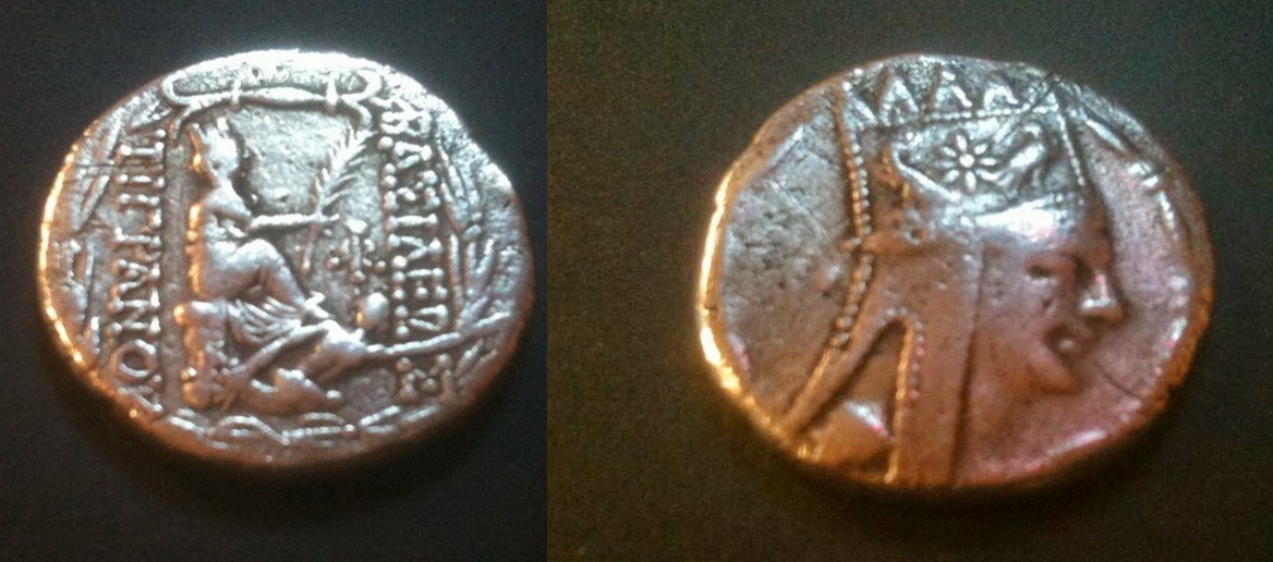 سکه تیگران دوم از مجموعه شخصی شهرام نگارشی